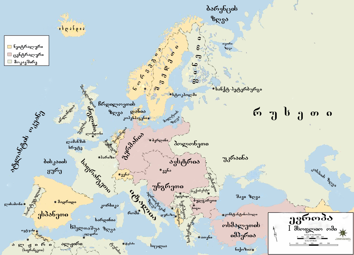 I მსოფლიო ომის რუკა (გაქართულებული)